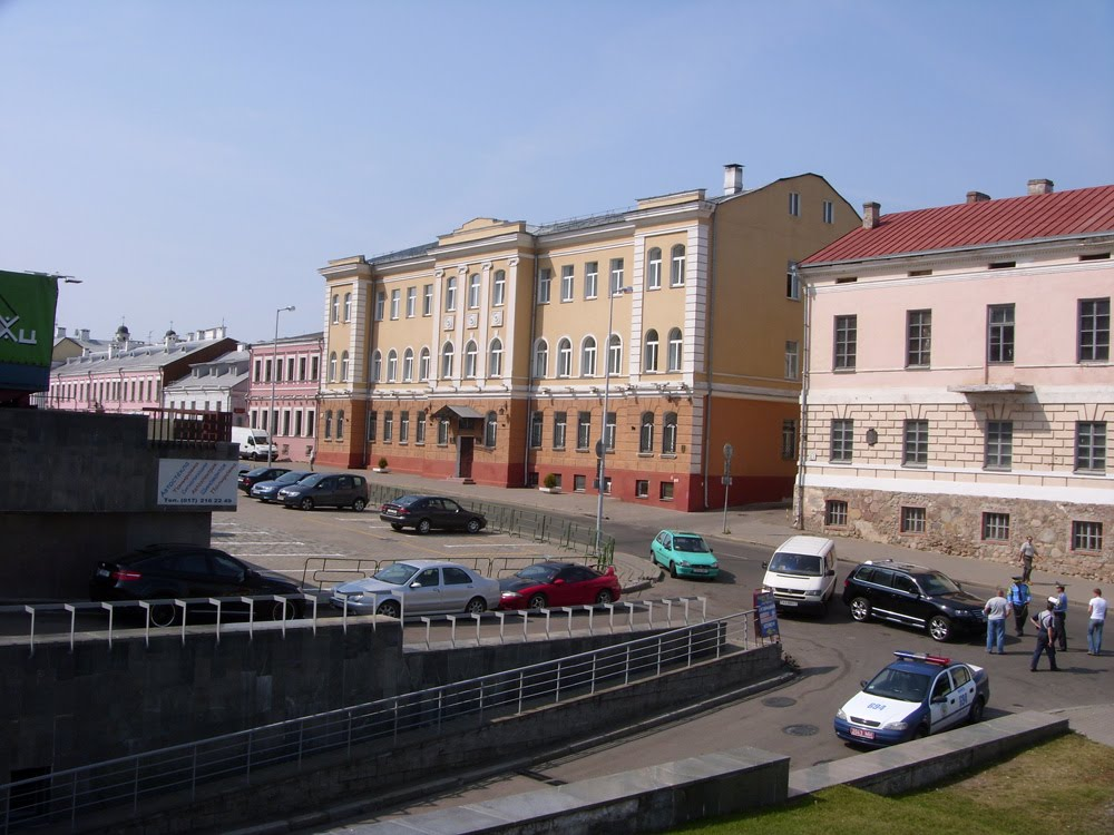 Улица Интернациональная